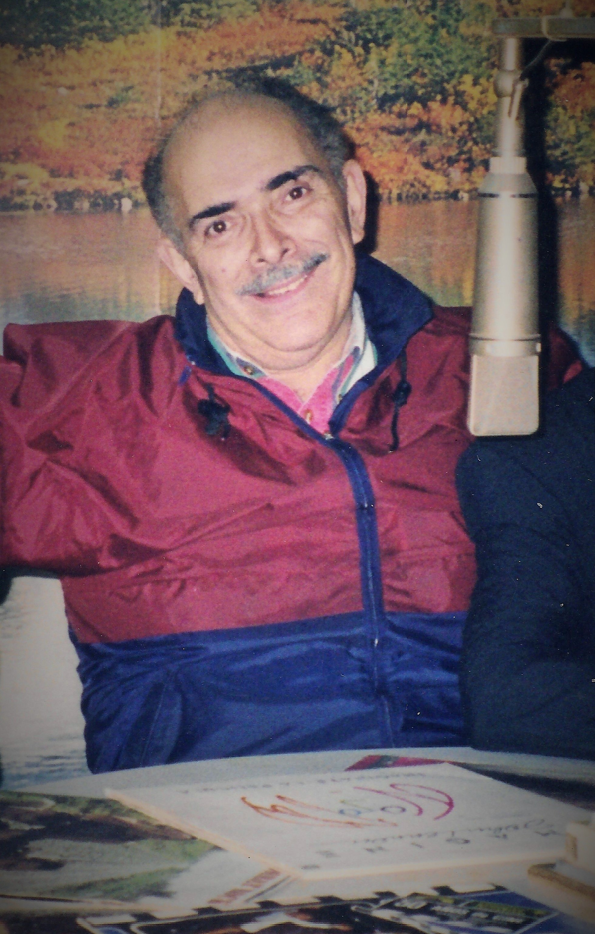 Adelio Suárez en los estudios centrales de LT4 Radiodifusora Misiones, calle Bolívar 318 de Posadas, en 1992, antes de la salida del programa "Joven y gastado". Fotografía del periodista Horacio Cambeiro.